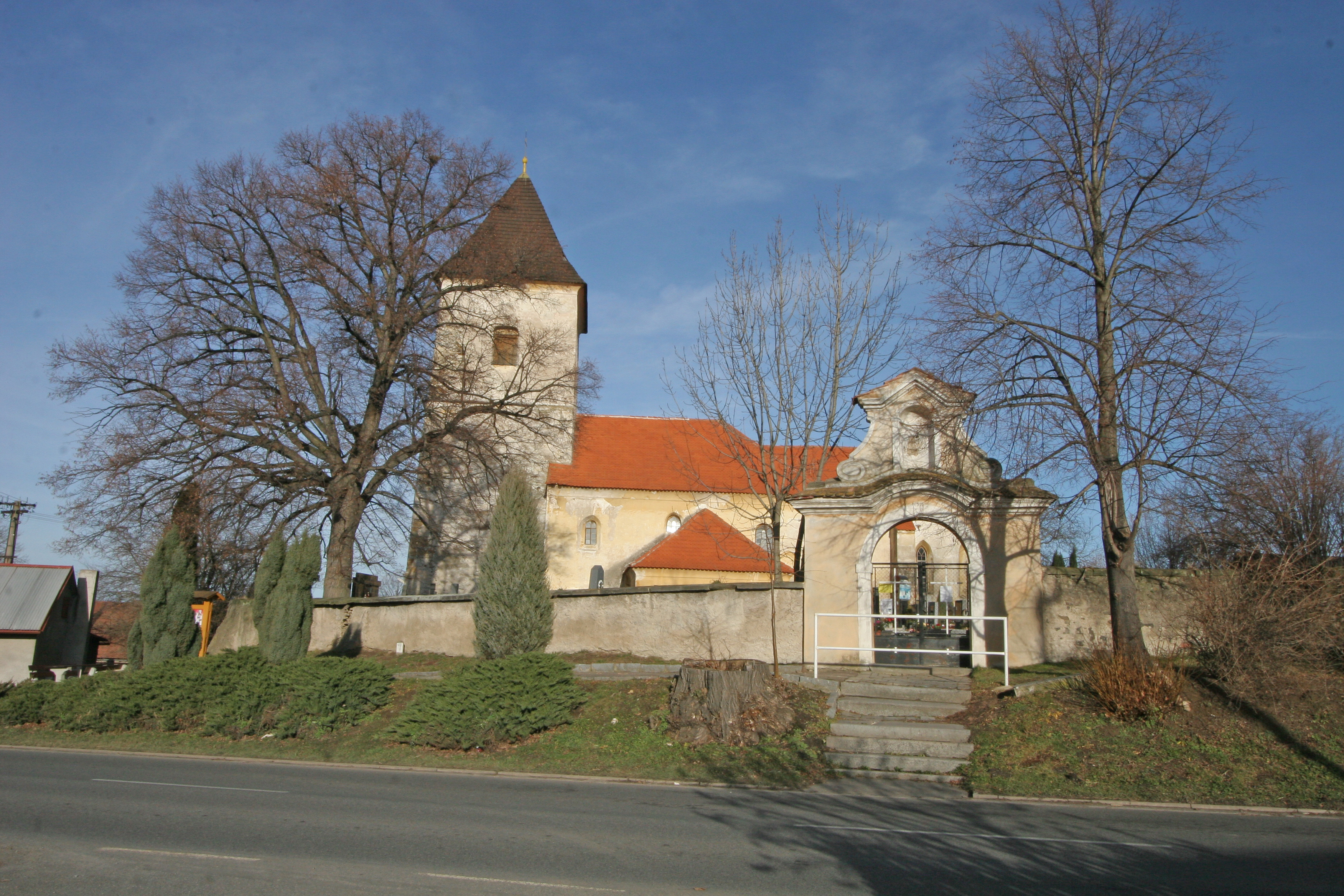 Kostel sv. Václava (Lažany), Lažany